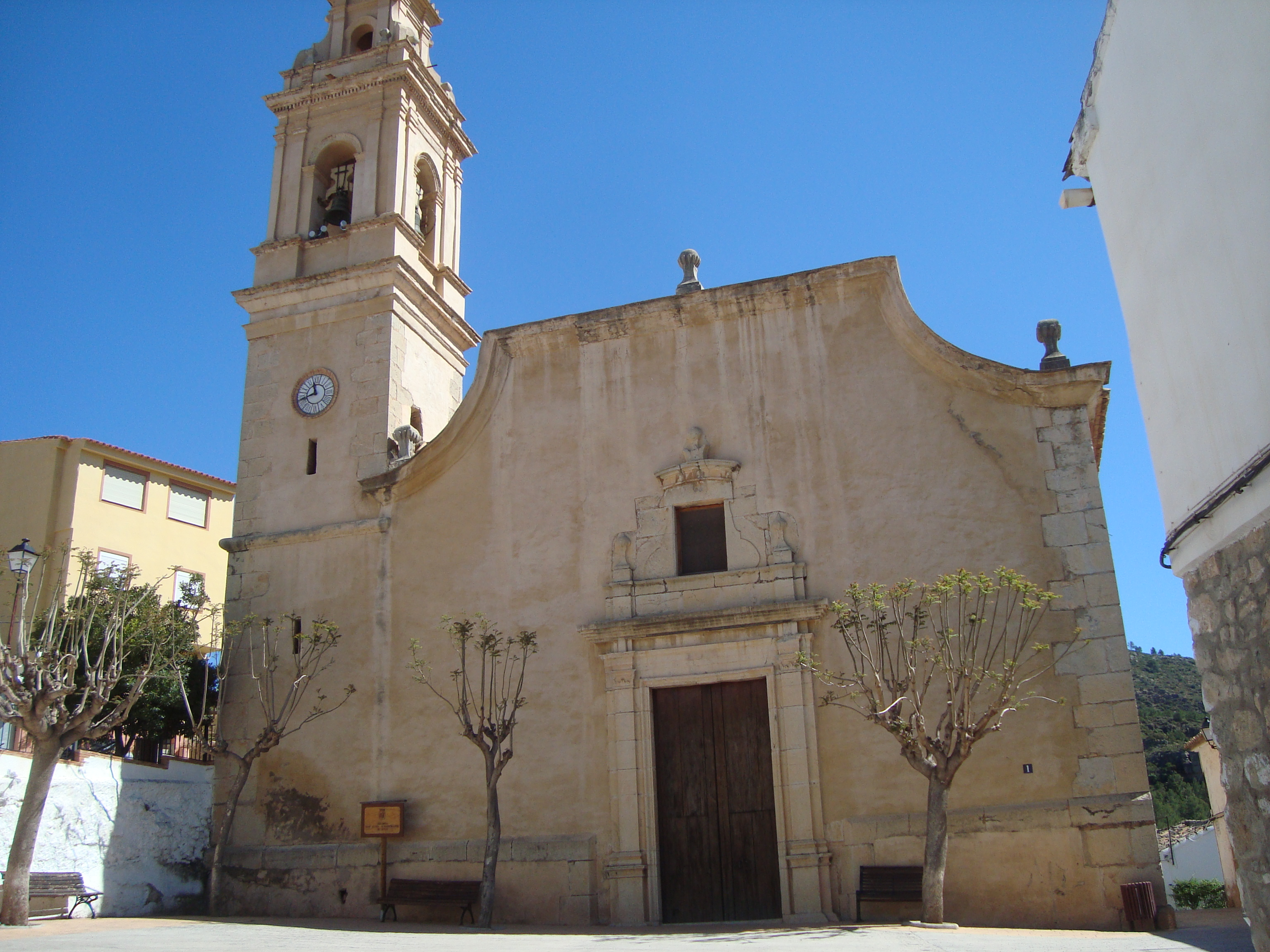 Església parroquial de Sant Joan Evangelista (Vallat) 08.123-001.